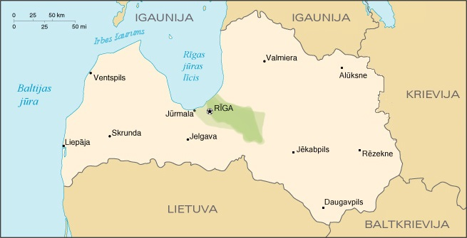 Daugavas Līvu zemes (novada) teritorijas variācijas pēc dažādām vēstures kartēm.